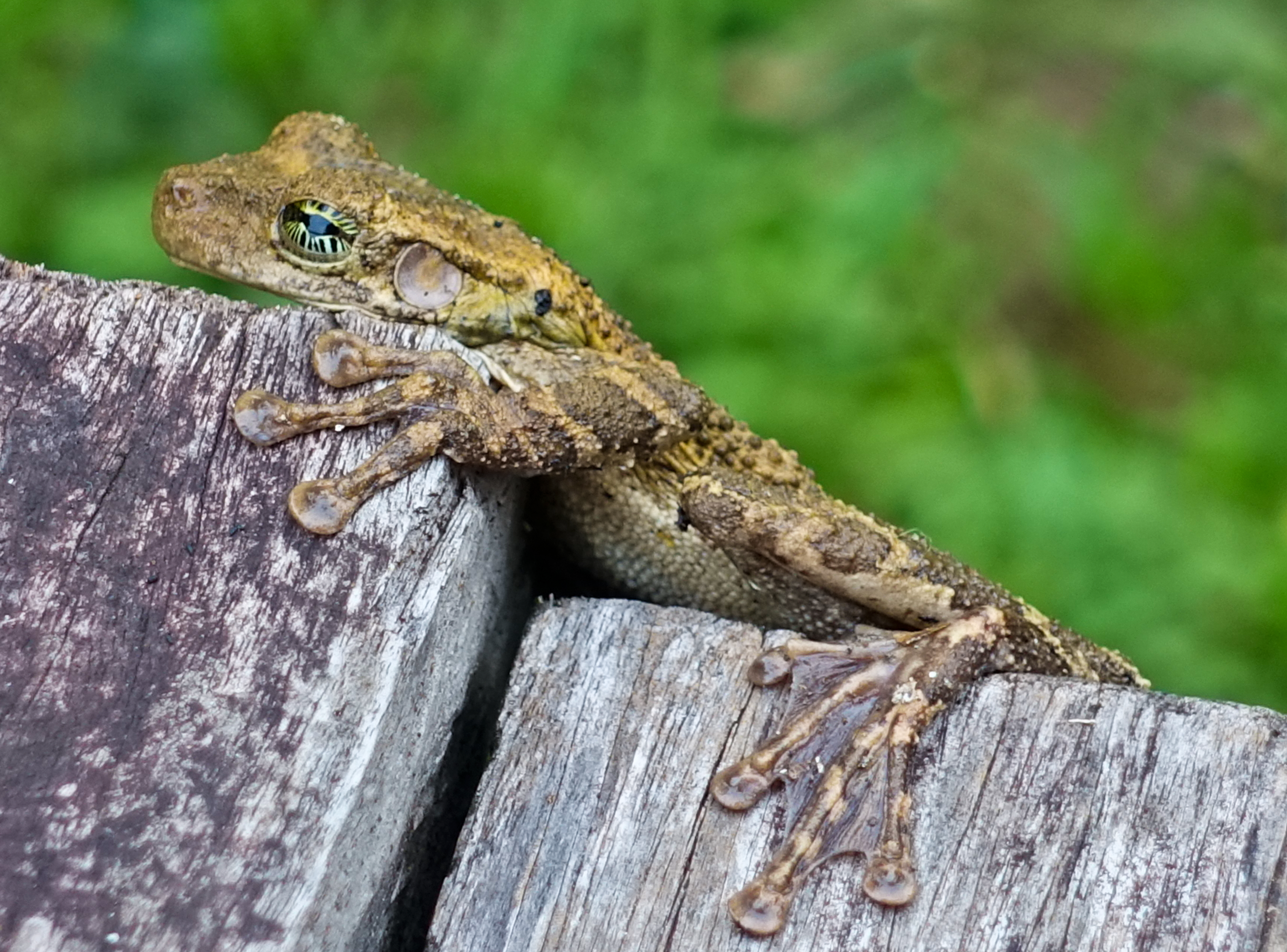 Laubfrosch, vermutlich Osteocephalus taurinus. Gefunden im Cuyabeno Wildtier-Reservat, Ecuador (Anfrage bei der DGHT: „Es handelt sich in jedem Fall um einen Vertreter der Gattung Osteocephalus, meist in der Region Cuyabeno als O. taurinus eingestuft, aber das ist insgesamt ein schwieriger Artenkomplex. Viele Grüße, Axel Kwet“